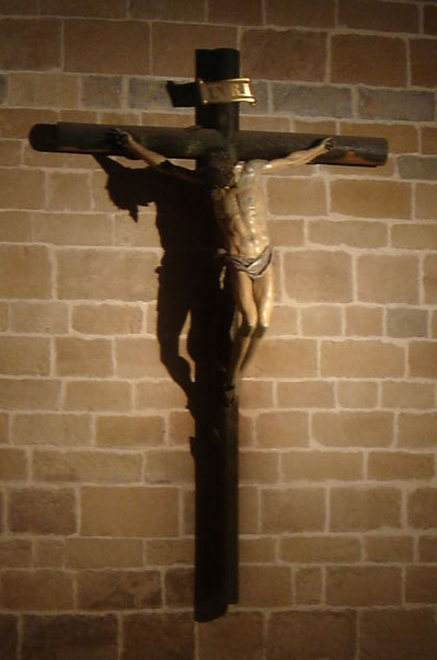 Cristo de Anchieta, catedral de Pamplona